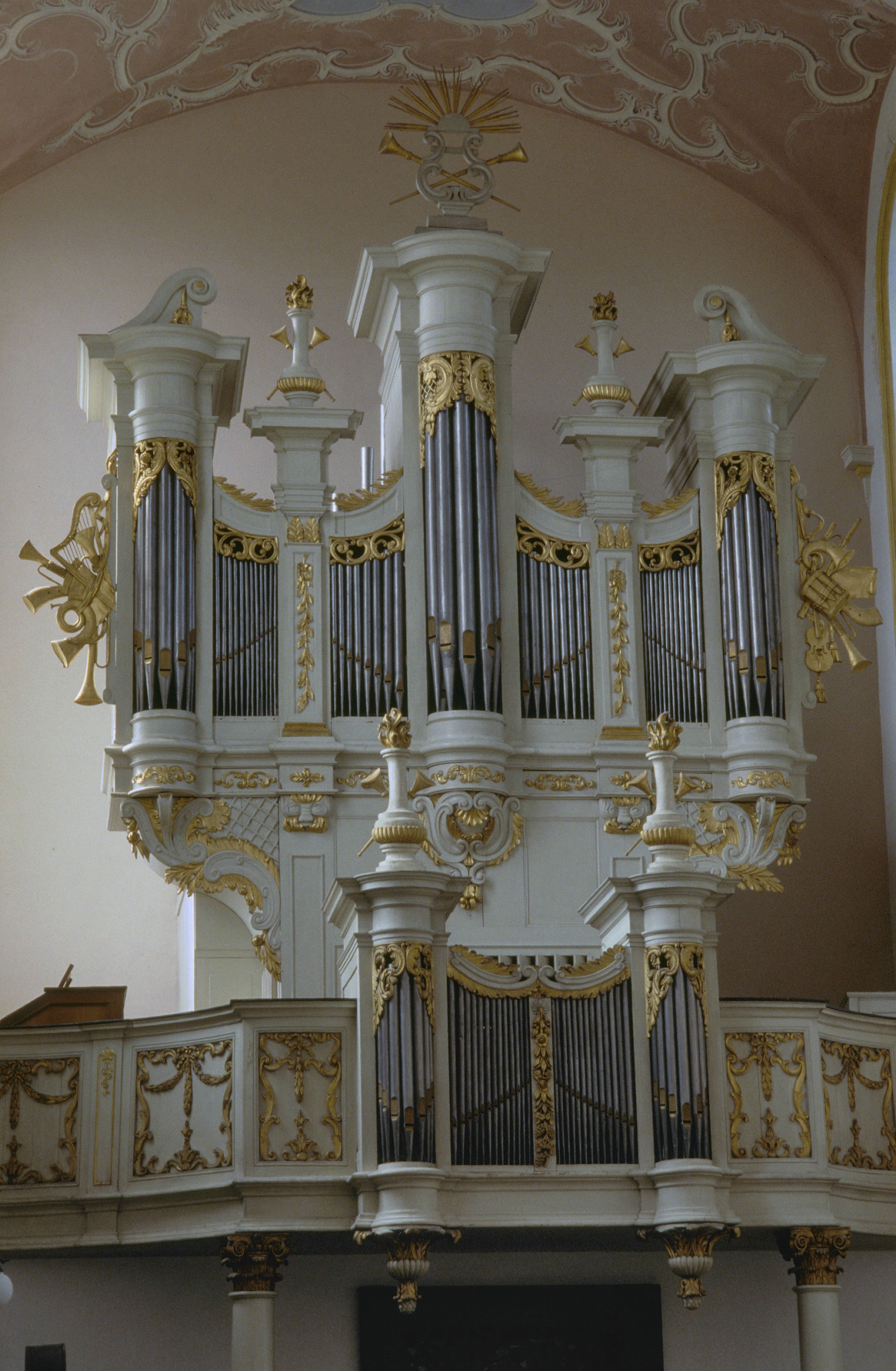 Landgoed Sint Gerlach: Interieur voormalige Caroluskapel, orgel